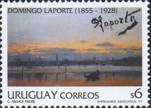 Un sello emitido nl el año 1997 en homenaje al pinturo y grabador uruguayo, Domingo Laporte. El sello reproduce su obra "Crepúsculo de Otoño - Venecia".